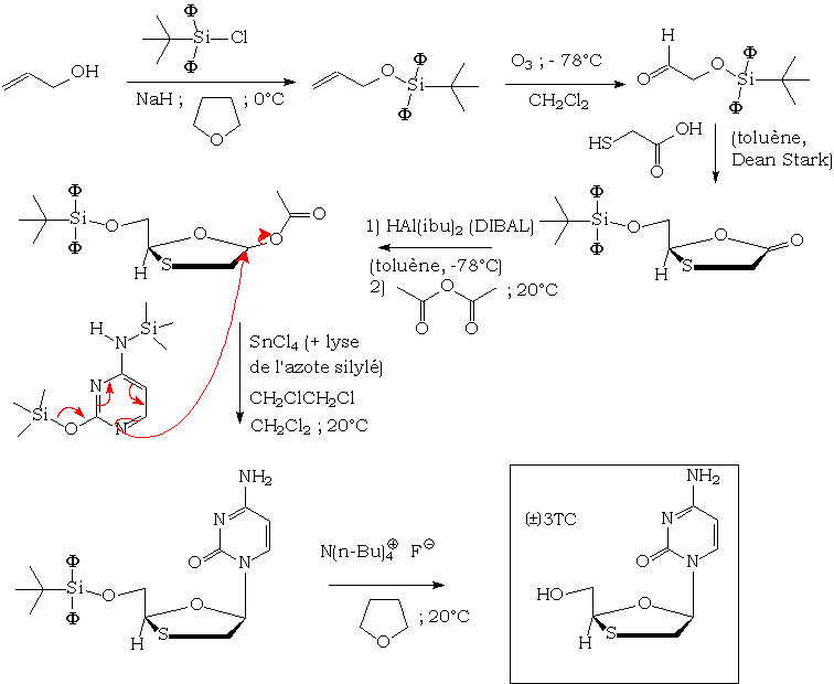 Auteur : Jengi Synthèse totale de la lamivudine ou BCH 189